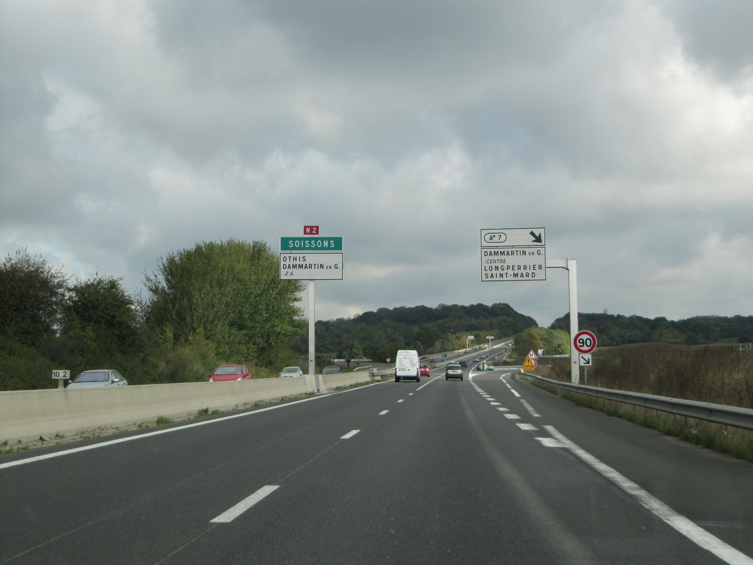 N2 richting oosten, bij Dammartin